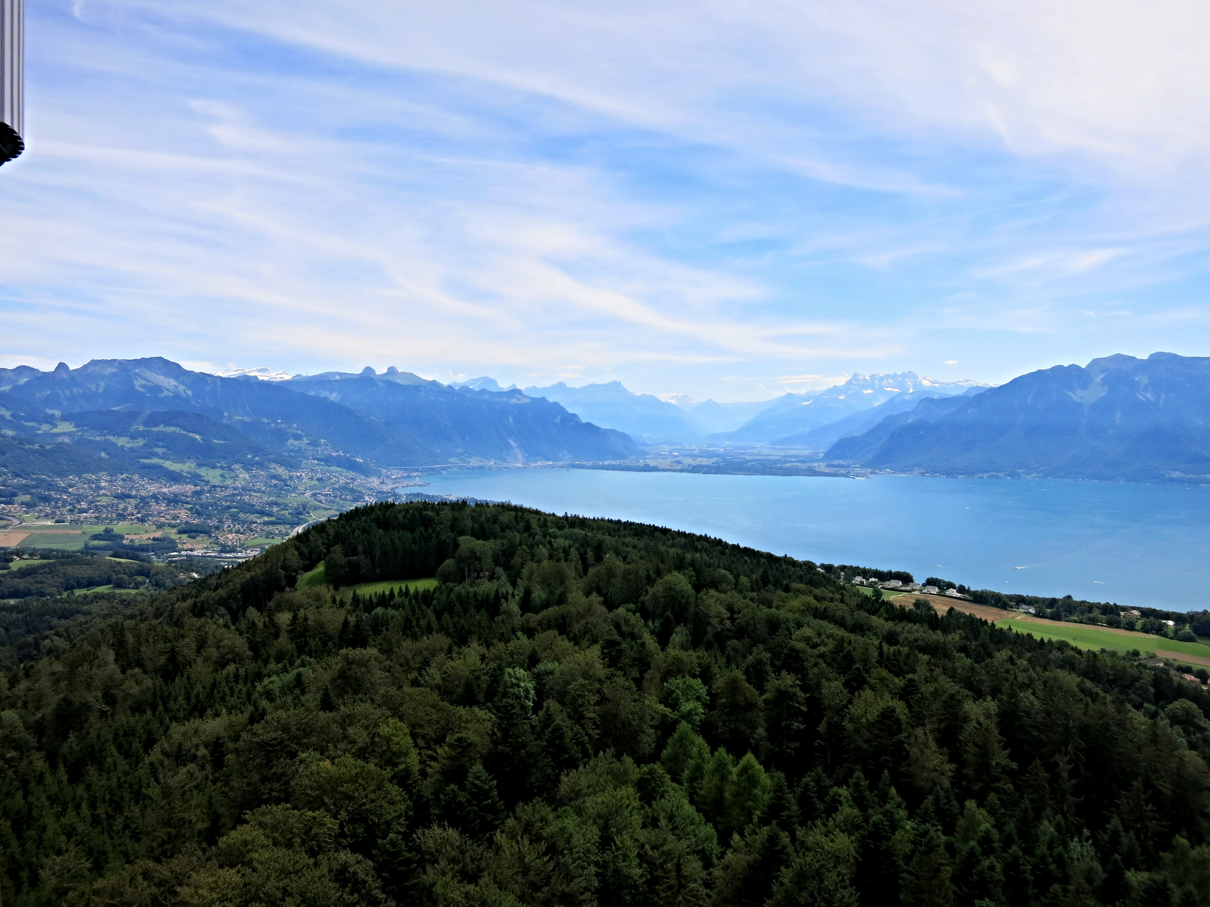 Aussicht vom Mont Pèlerin Fernsehturm Richtung Süden